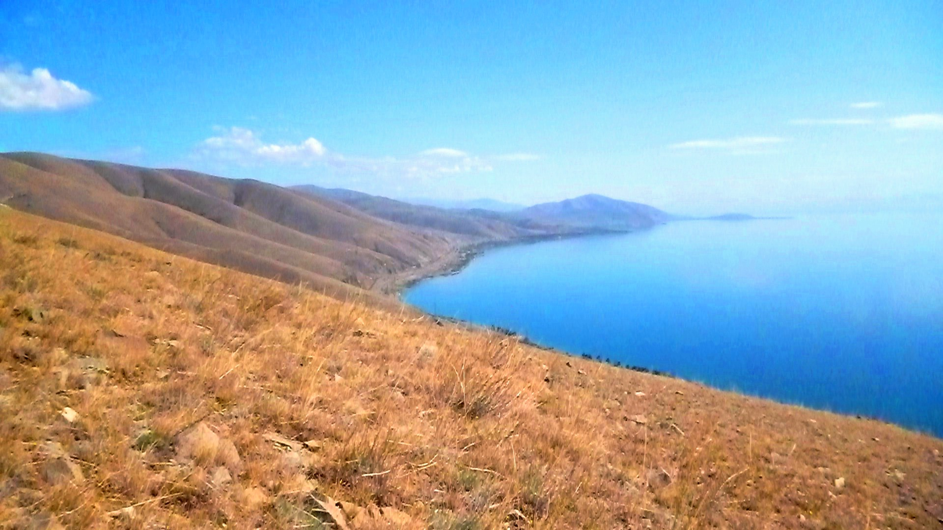 GR-NP001